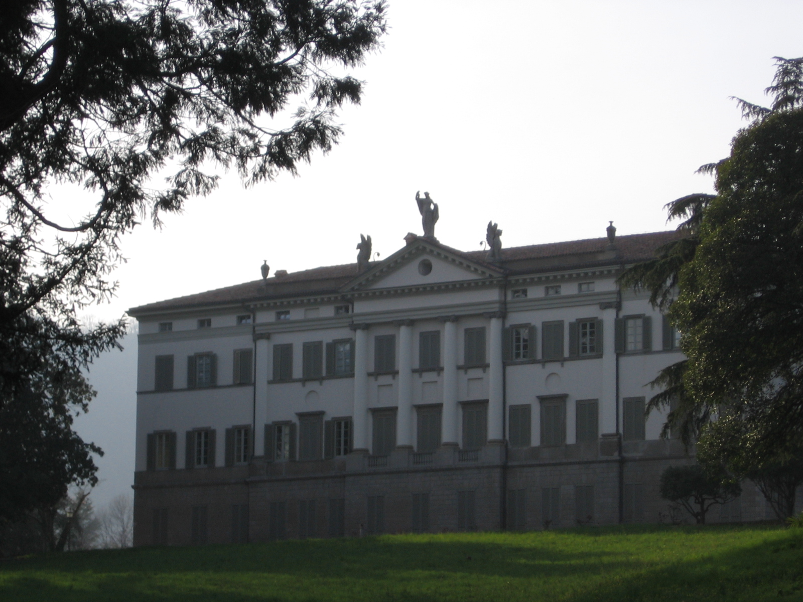 Ranica, Bergamo, Italia